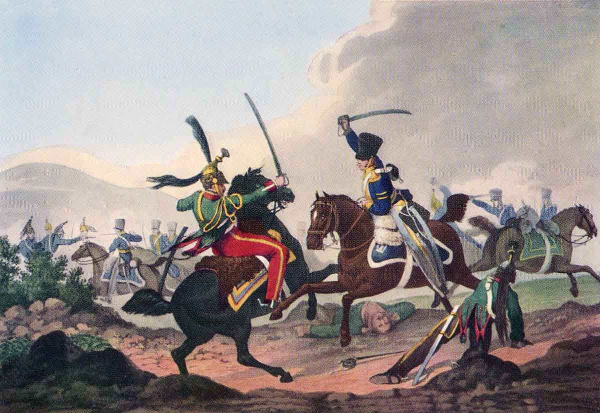 Duel entre le caporal Logan du 13e dragons légers et le colonel Chamorin du 26e régiment de dragons lors du combat de Campo Maior, 25 mars 1811. Après avoir fracassé le casque de son adversaire, Logan tue Chamorin en lui fendant le crâne d'un coup de sabre.